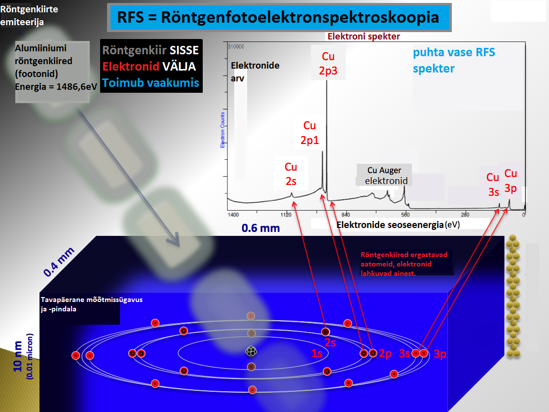 RFS füüsika – "Fotoefekt